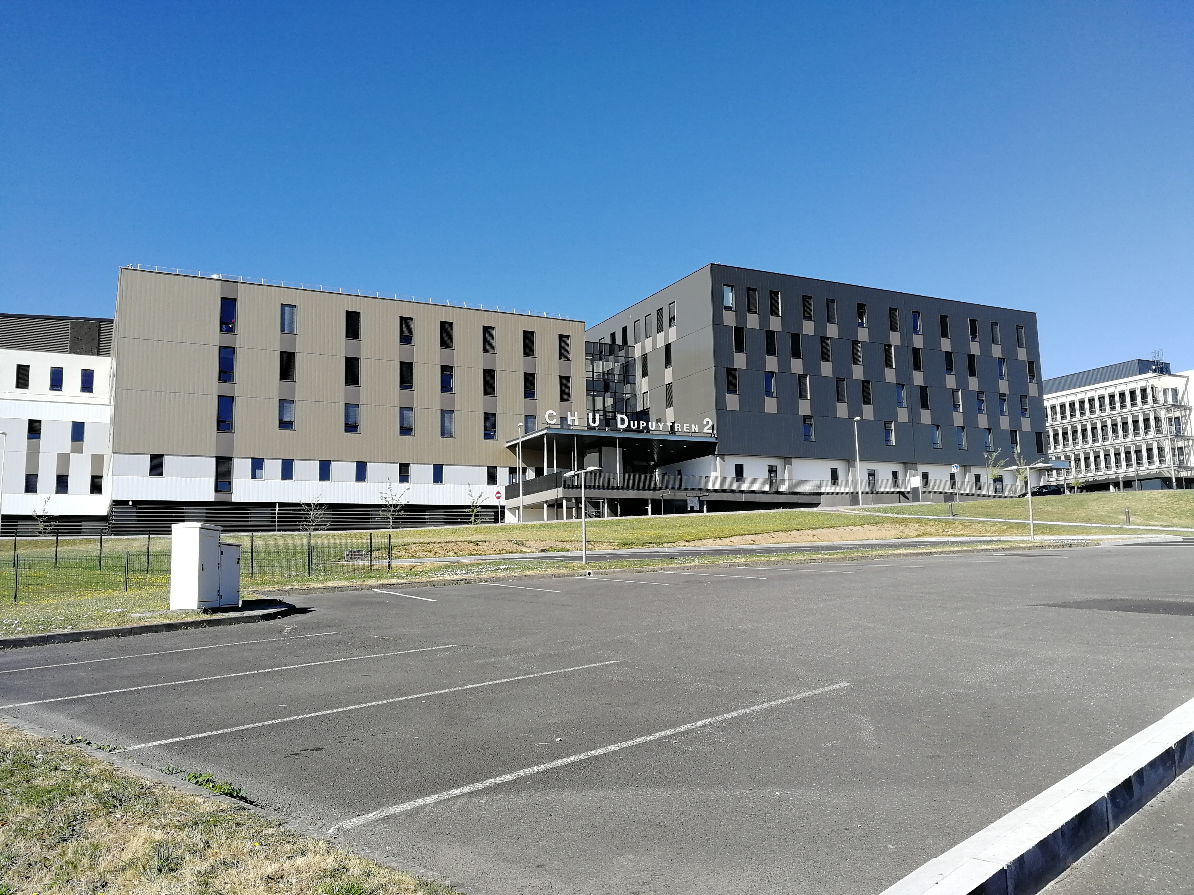 Le site Dupuytren 2 du centre hospitalier universitaire de Limoges, inauguré en 2019.